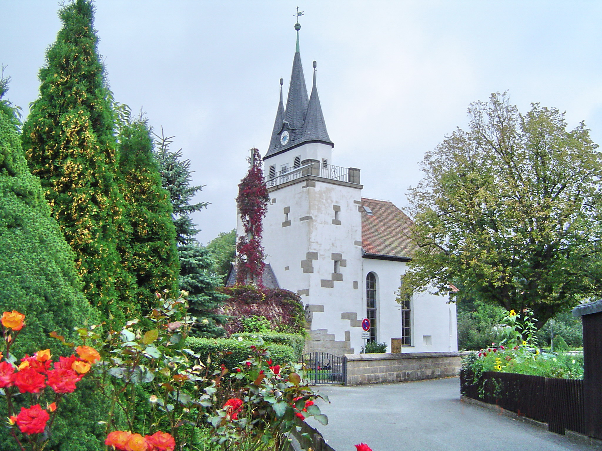 Glashütten, evang. St. Bartholomäuskirche